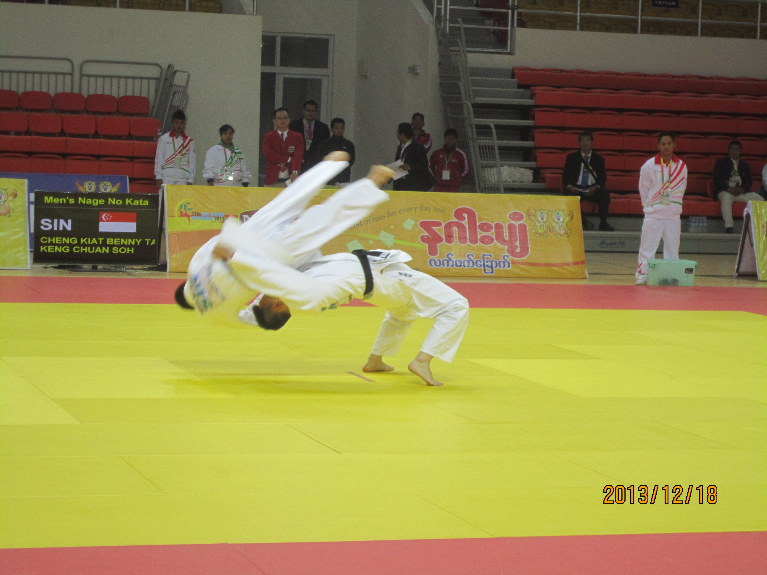 投の形の演技 sea gameで